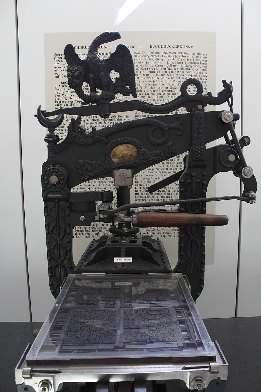 Jernhåndpresse (Colombiapresse) fra Deusches Museum i München